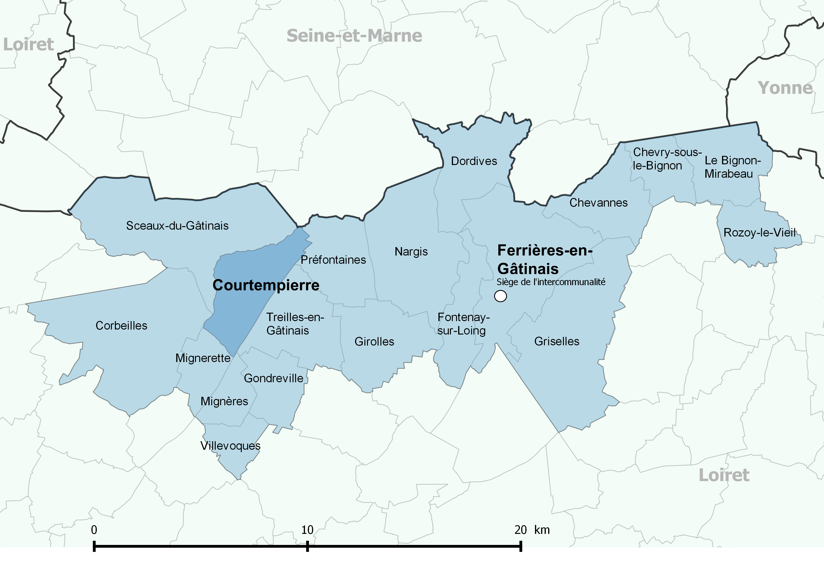 Périmètre de la communauté de communes des Quatre Vallées (Loiret) - Positionnement de la commune de Courtempierre.